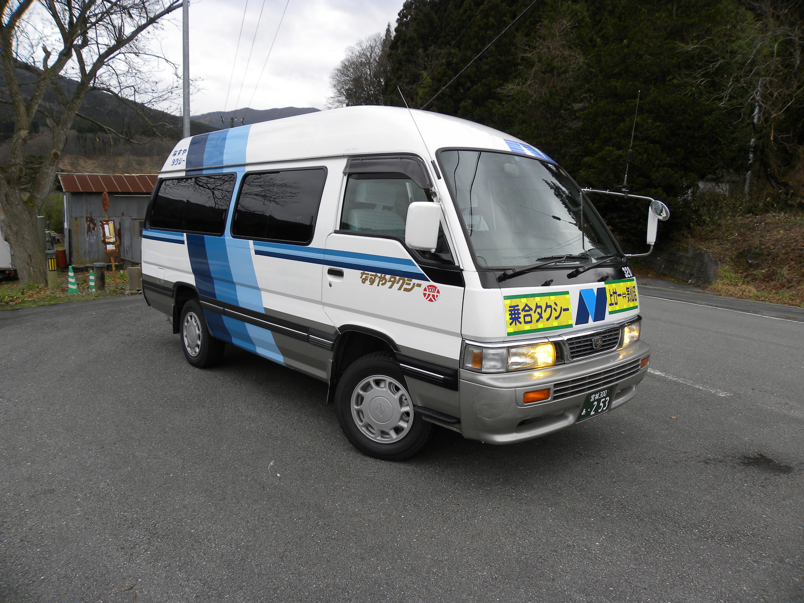 なすやタクシー 気仙沼市乗合タクシー「悠悠」の車両